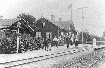 Swedish railway station Åsen, Halmstad-Bolmens Järnväg